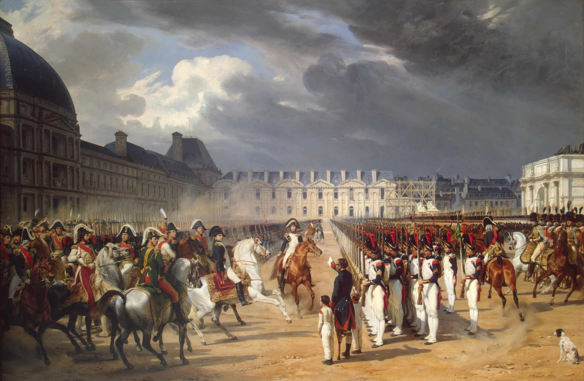 Napoléon aux Tuileries, peinture d'Horace Vernet